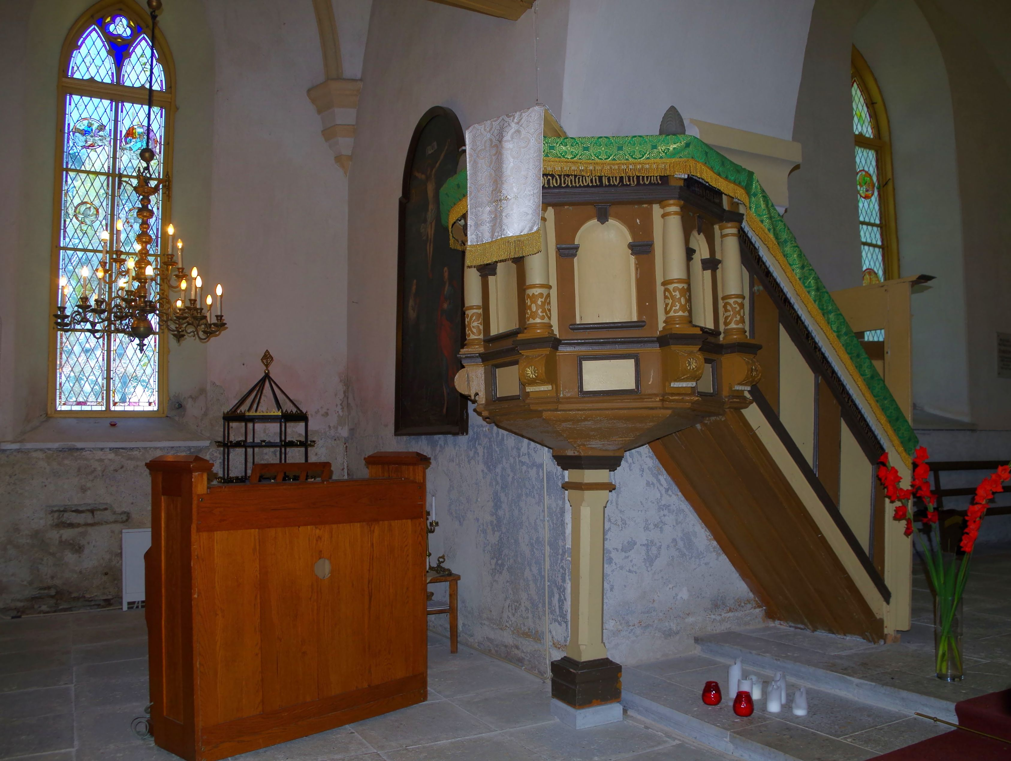 Kantsel, T.Heintze, 1639 (puit, polükroomia)